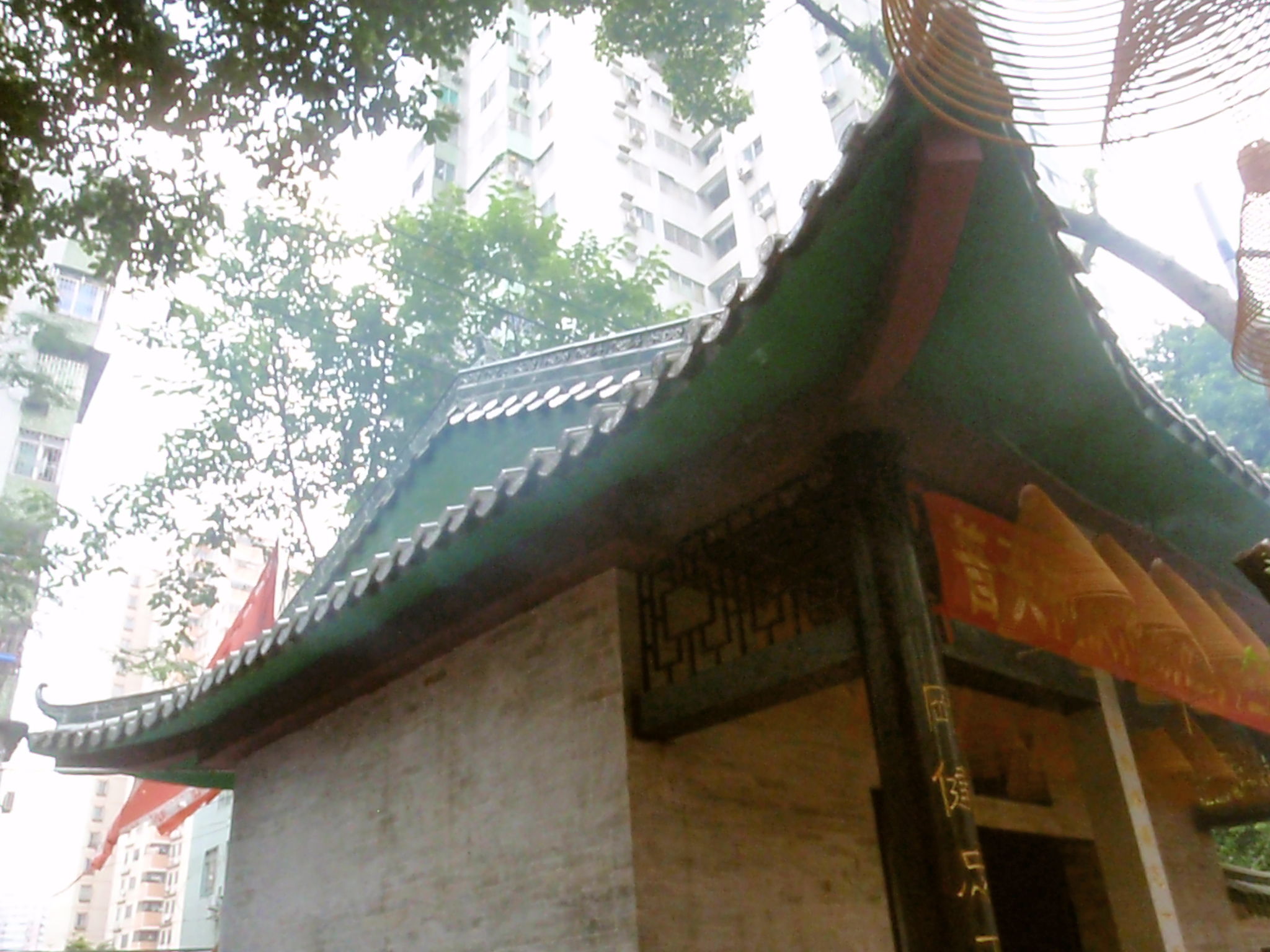 廣州河南小港關帝新廟